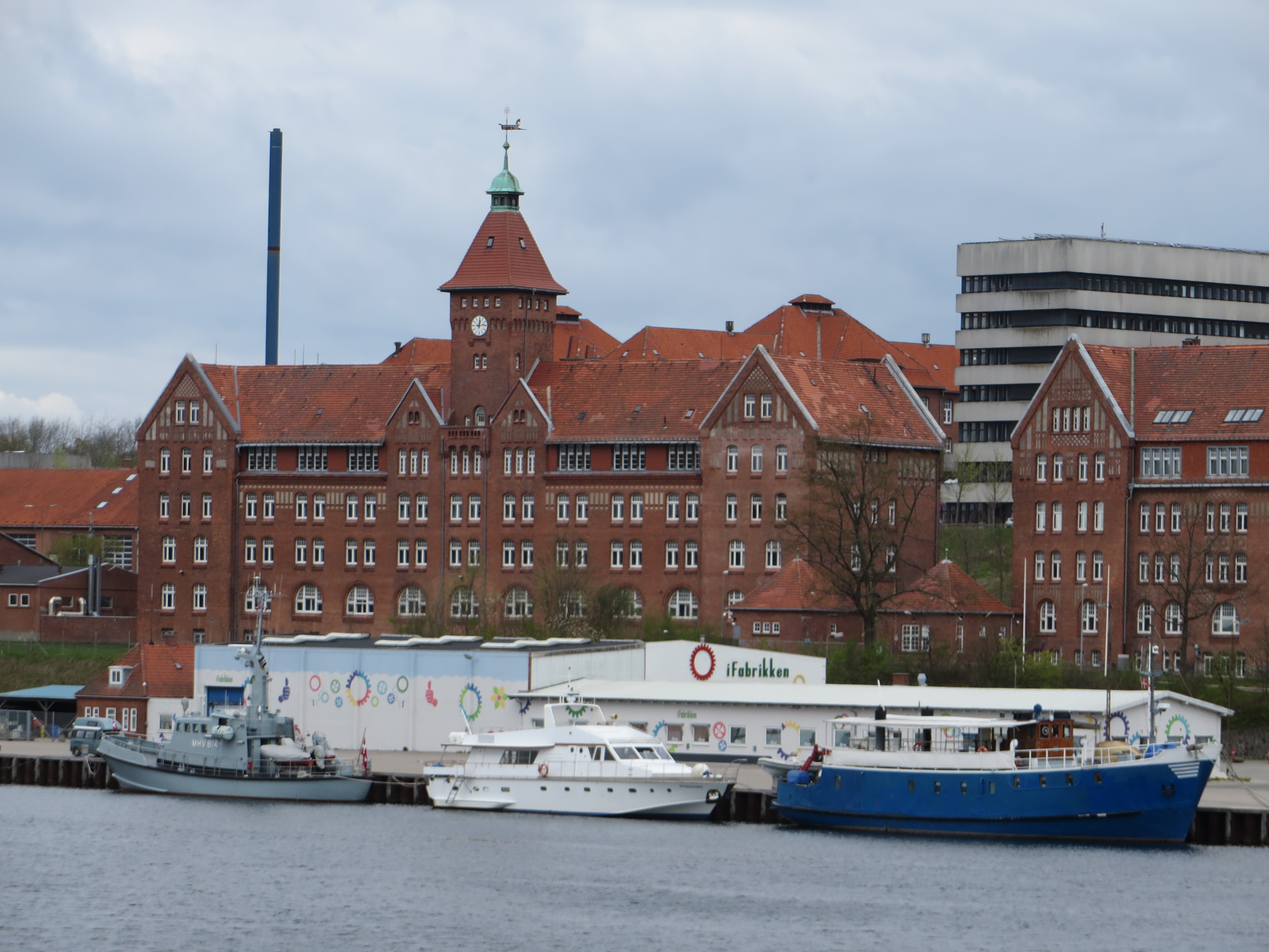 Sonderburg Kaserne, Gebäude mit dem Hauptturm (2014), Bild 001